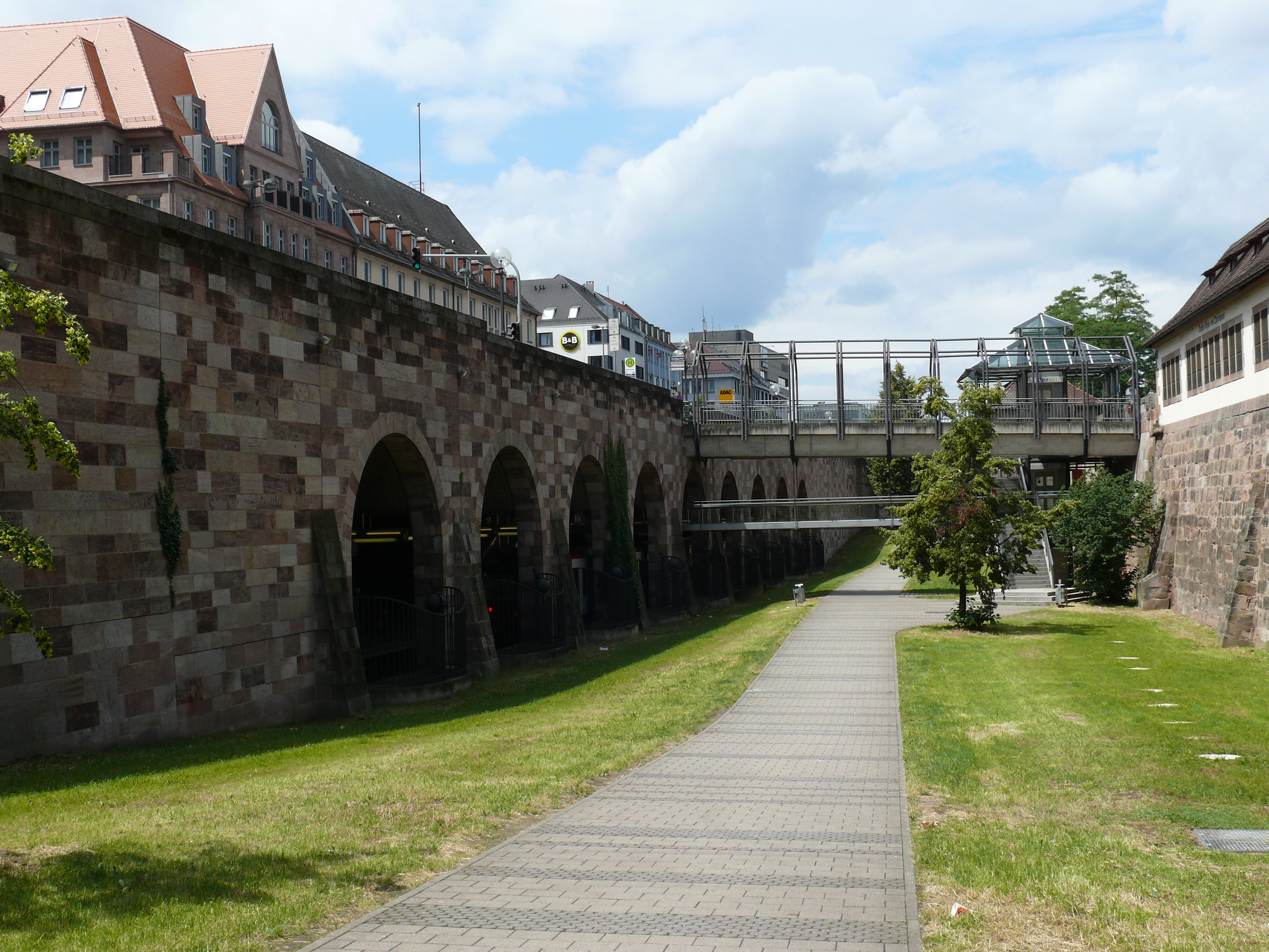 Blick entlang des Stadtgrabens, mit dem U-Bahnhof Opernhaus in Nürnberg links.